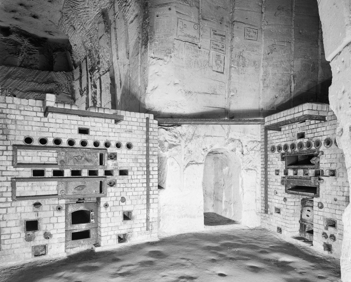 Sint-Pietersberg: interieur gangenstelsel, oven gebouwd voor schuilkelder i.v.m. evacuatieplannen in de Tweede Wereldoorlog.